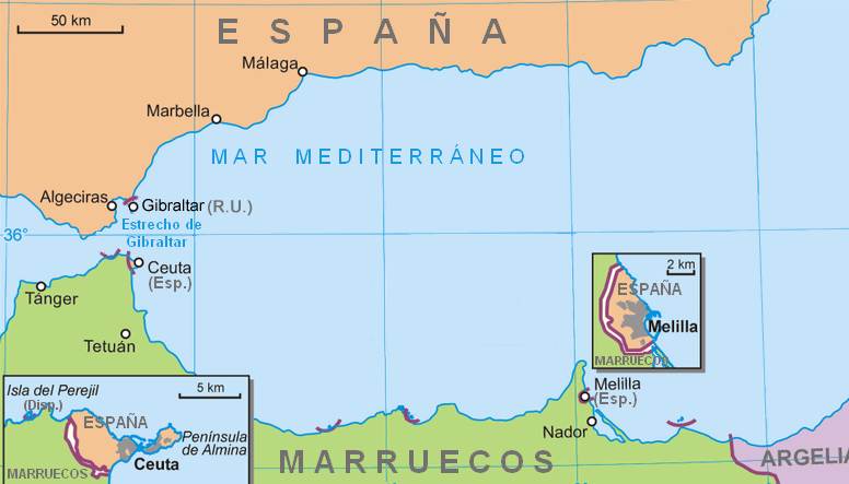 Image:Mapa_del_sur_de_España_neutral.png modified.